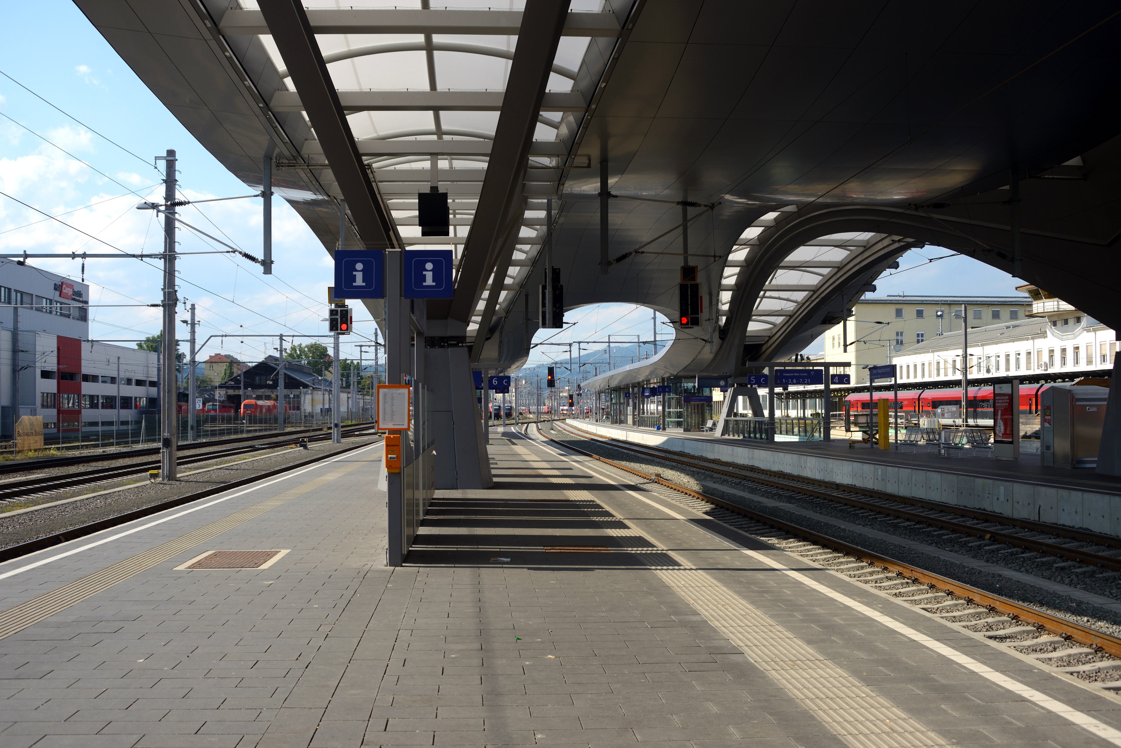 Bahnsteige 6 und 7 am Grazer Hauptbahnhof